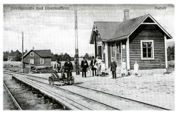 Swedish railway station Mahult at Halmstad-Bolmens Järnväg.